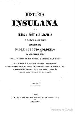 Photographie prise aux archives historiques de Madère